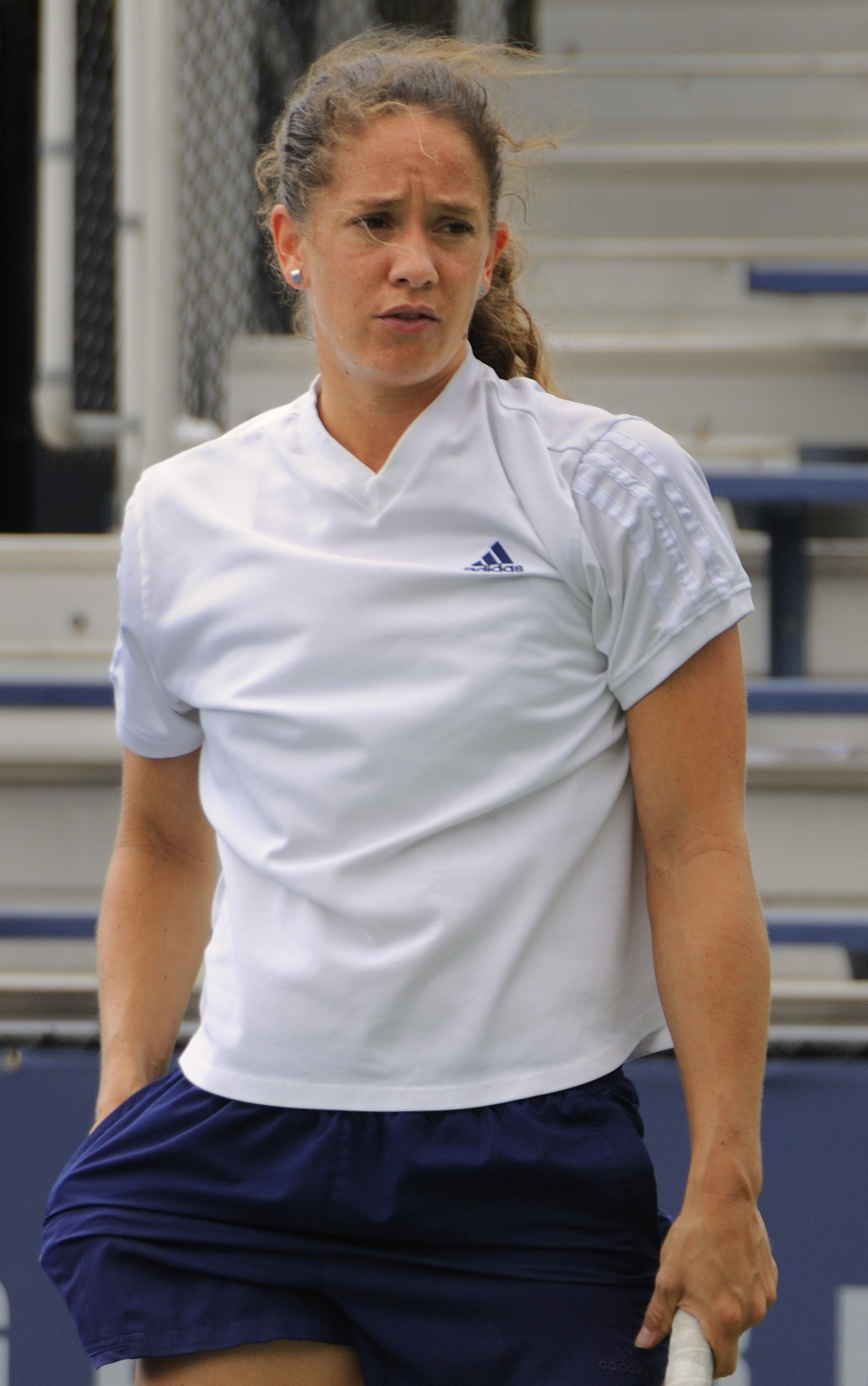 Patty Schnyder at 2008 US Open